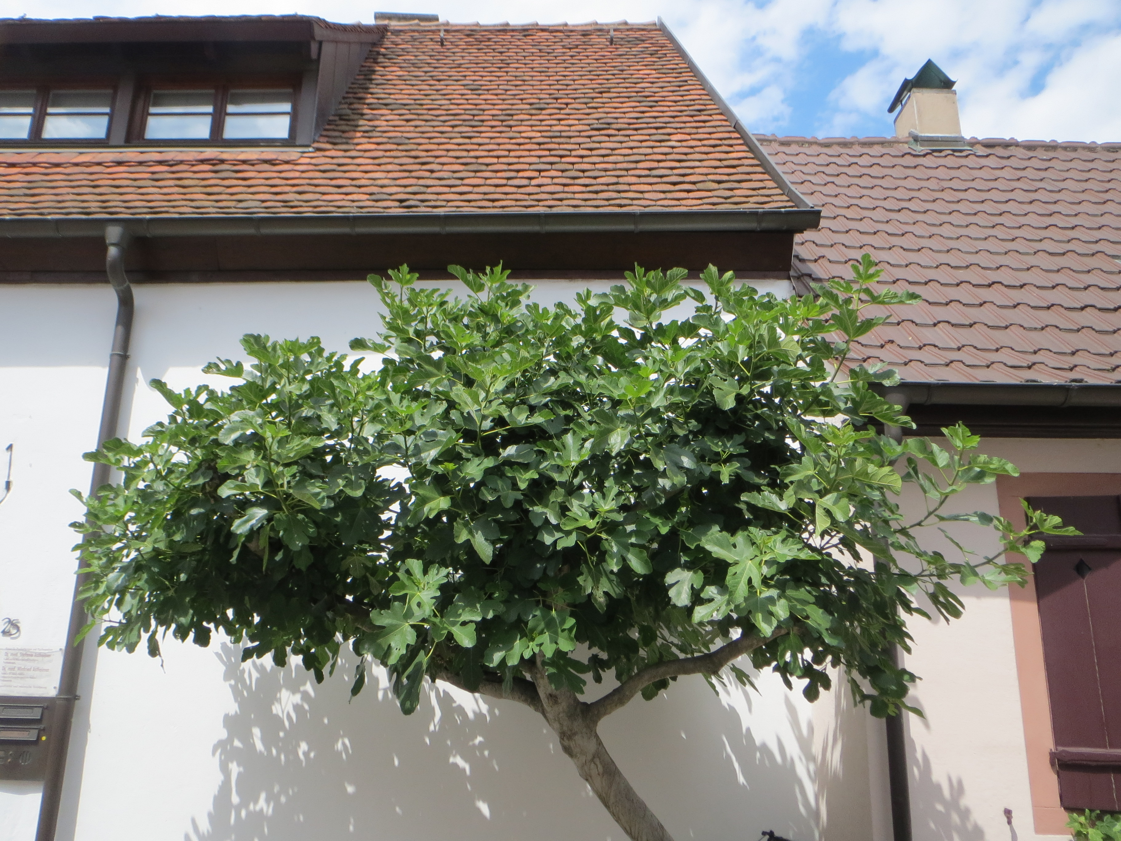 Feigenbaum (Ficus carica) in Speyer